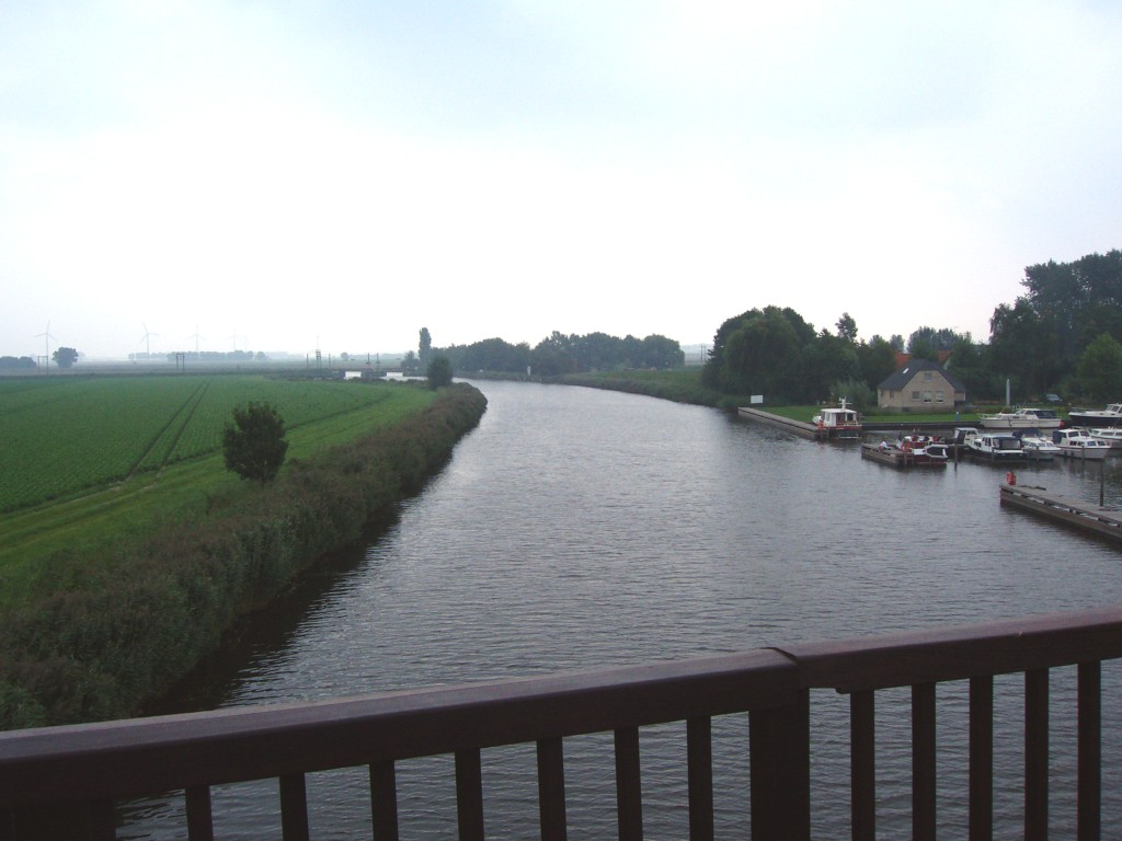 Mark River near Zevenbergen, Netherlands